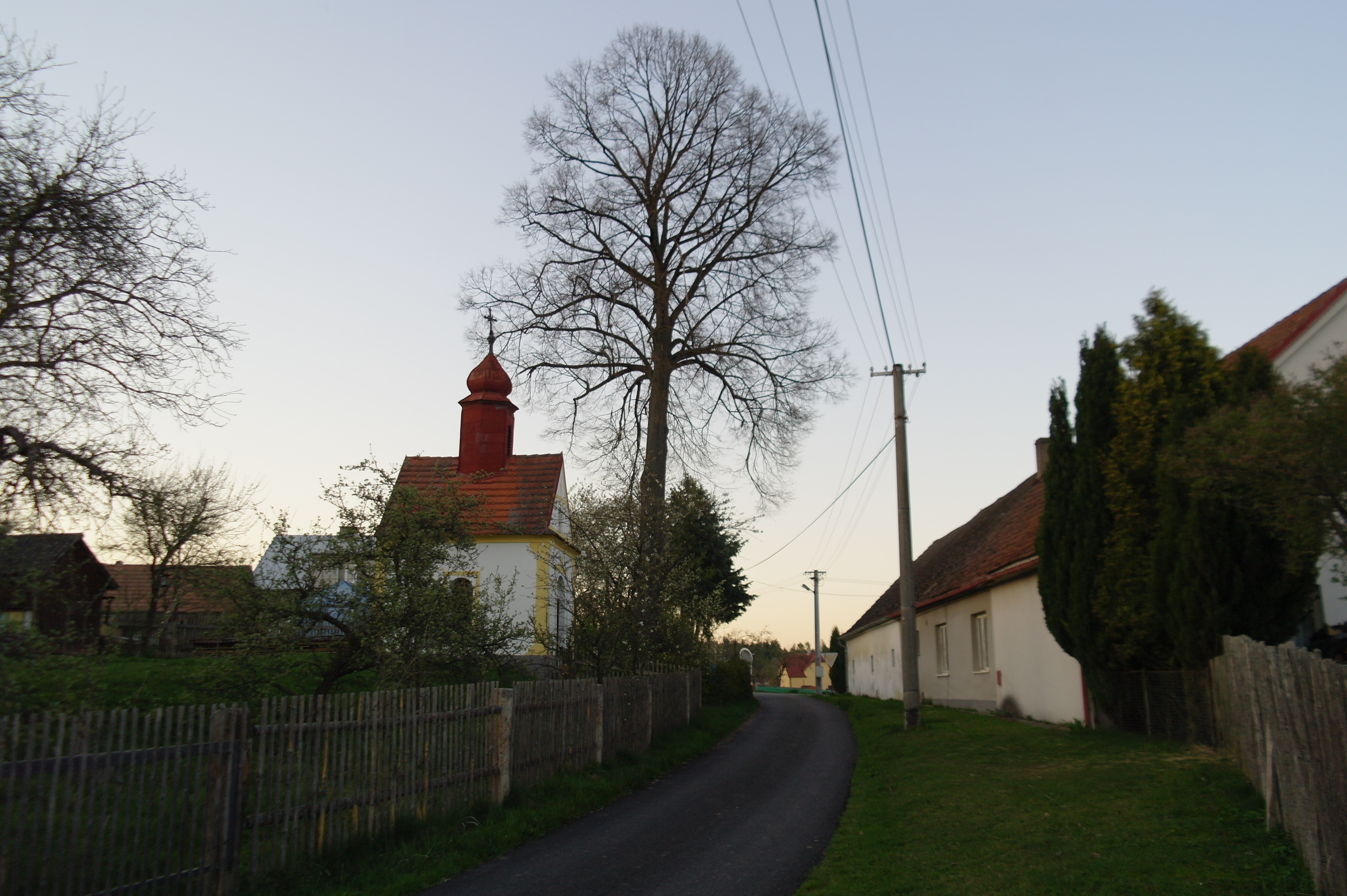 Radimov (Skalice). Česká republika.